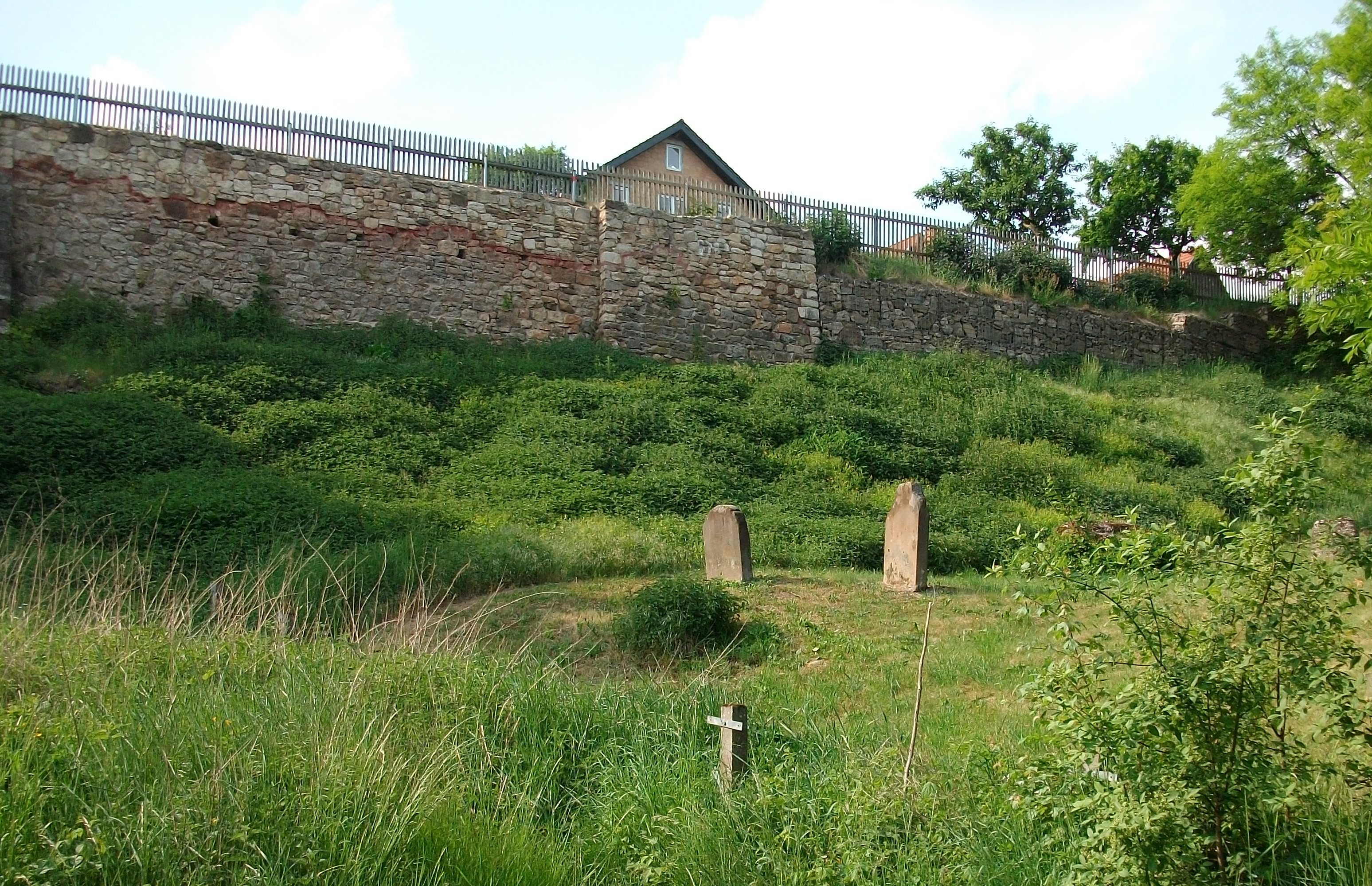 Obermarsberg - Stadtmauer und jüdischer Friedhof, Marsberg, Germany.